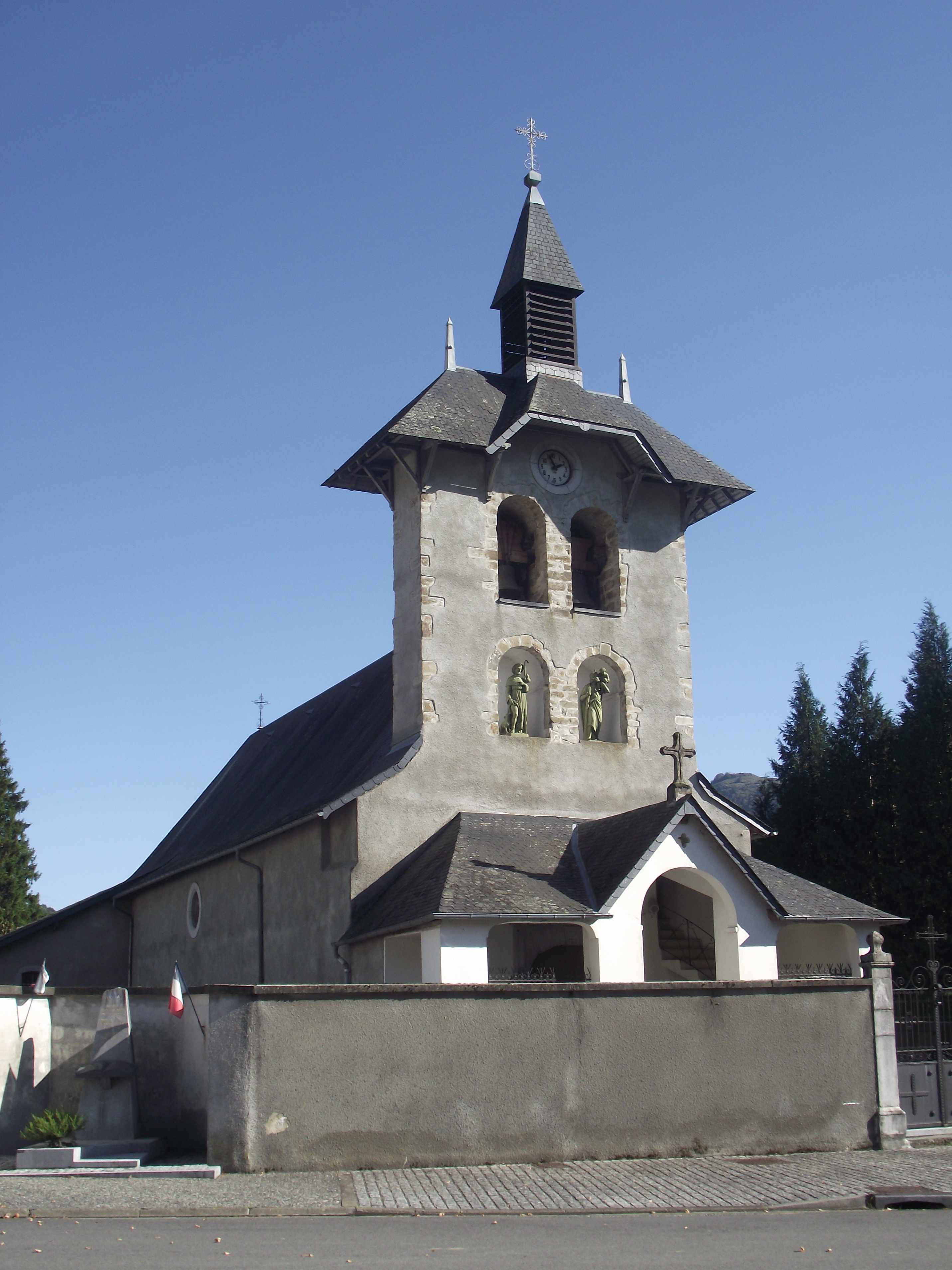 Église Saint-Martin de Peyrouse (Hautes-Pyrénées, France)